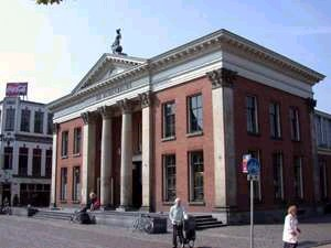 Groningen, Koornbeurs